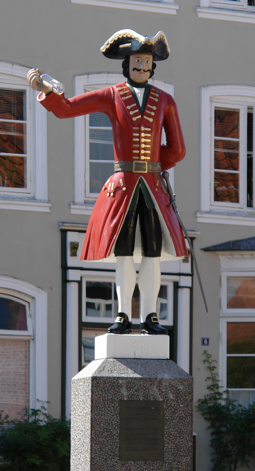 Tønder: Kopie der Staupe-Figur (Kagmand) von 1699, die jetzt im Museum von Tønder steht. Diese Figur des Profos (Soldat, der kleine Strafen ausführen musste) wurde 1993 gestiftet.